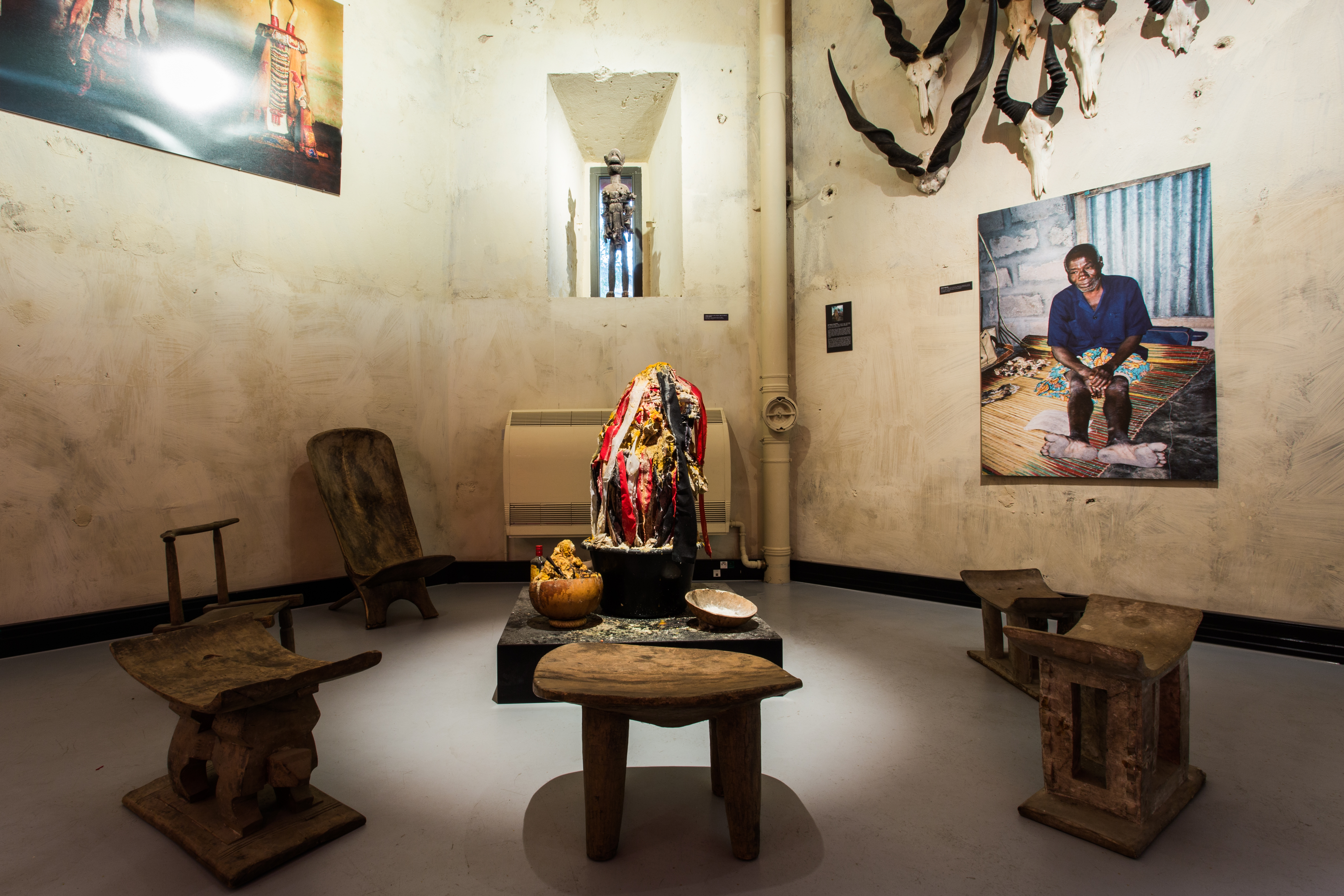 Composée entre autre de tissus noir, blanc et rouge, de crânes de chevreaux, de cire et d’huile de palme Kélessi est un fétiche qui a été construit par un sorcier vodou : un bokono. Ce bokono se nomme « Azé Kokovivina », il vient de Lomé. Il a fabriqué Kélessi afin de protéger les objets de la collection qui ont pu être exposés par le passé au musée Branly à Paris, à Bonn et à Madrid. Kéléssi a ensuite suivi les objets de la collection lors de leurs déplacements. Kélessi est une entité féminine. Il est le seul fétiche vivant du musée, c’est à dire qu’il est régulièrement activé en le nourrissant d’alcool et de temps en temps du sang de poulets sacrifiés. Il est assez agressif si on le délaisse mais il réalise aussi des vœux si on le lui demande en l’arrosant de gin. Photo d’une exposition du château Vodou de Strasbourg.